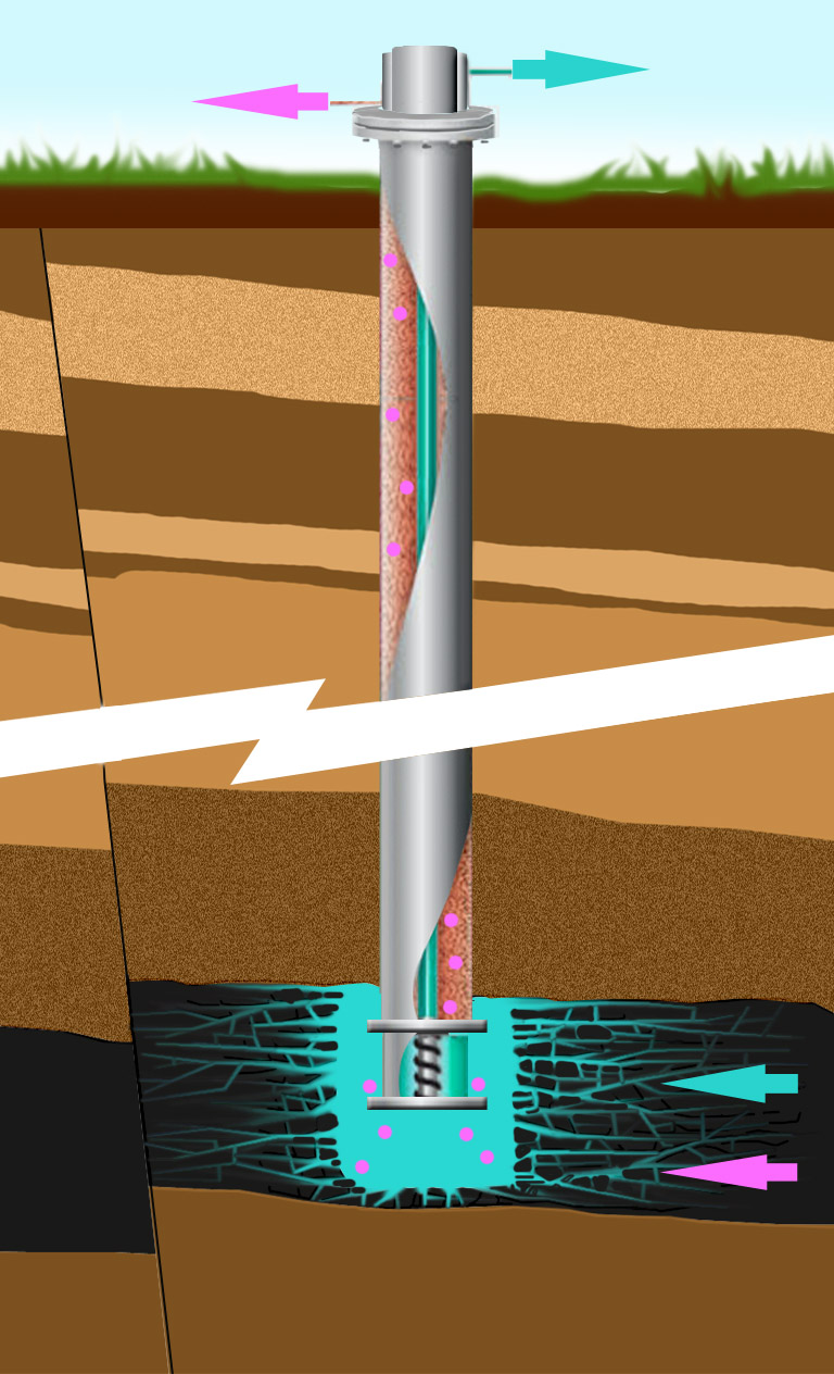 Représentation très simplifiée de l'utilisation d'une pompe hélicoïdale (Pompe volumétrique auto-amorçable et supportant des particules, sable, gravier, etc.) pour mise en dépression d'une couche de charbon afin d'en extraire le méthane (gaz de couche) qui y était adsorbé.